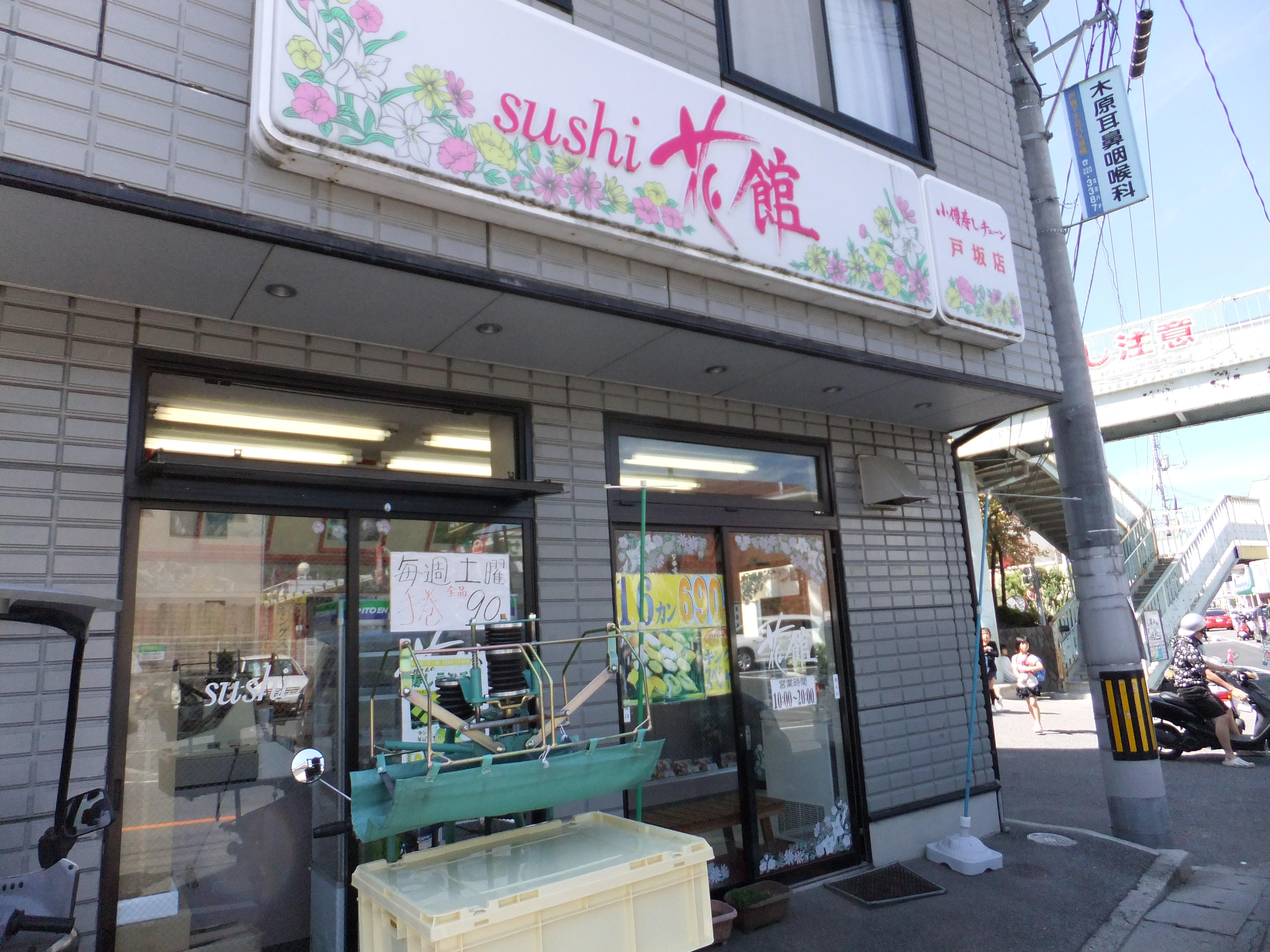 小僧寿し戸坂店